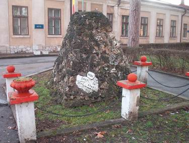 Spomenik palim umrlim i preminulim pripadnicima bolnice u Prvom svetskom ratu. Zna se da je tu piramidu 1915. godine sagradio Rista Jovanović, bolničar-dobrovoljac, solunac i potonji vrlo ugledni niški stolar.